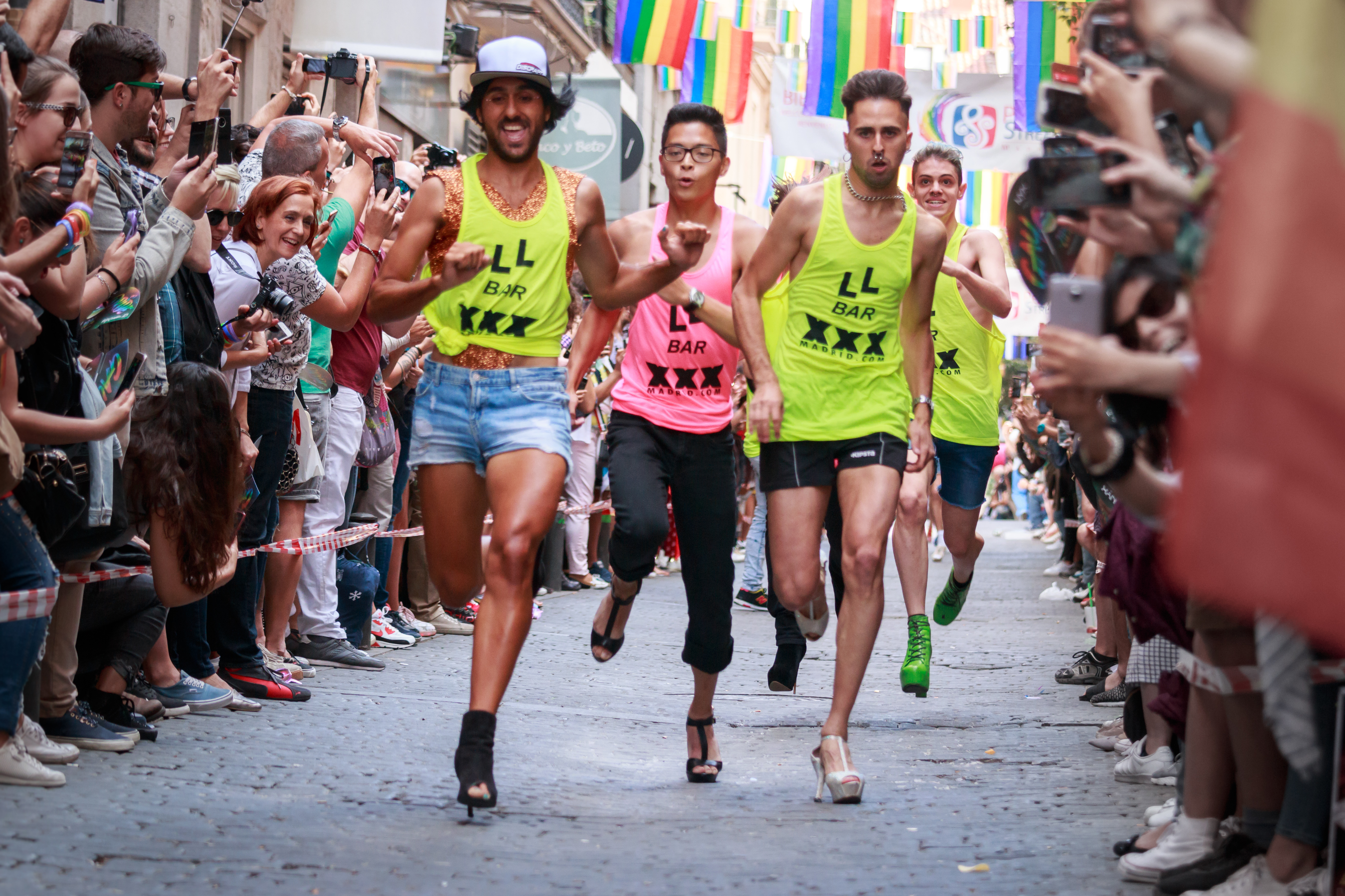 Carrera de tacones. WorldPride 2017. Madrid.